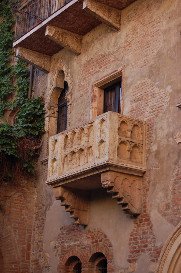 Fotografia della balcone di Giulietta a Verona